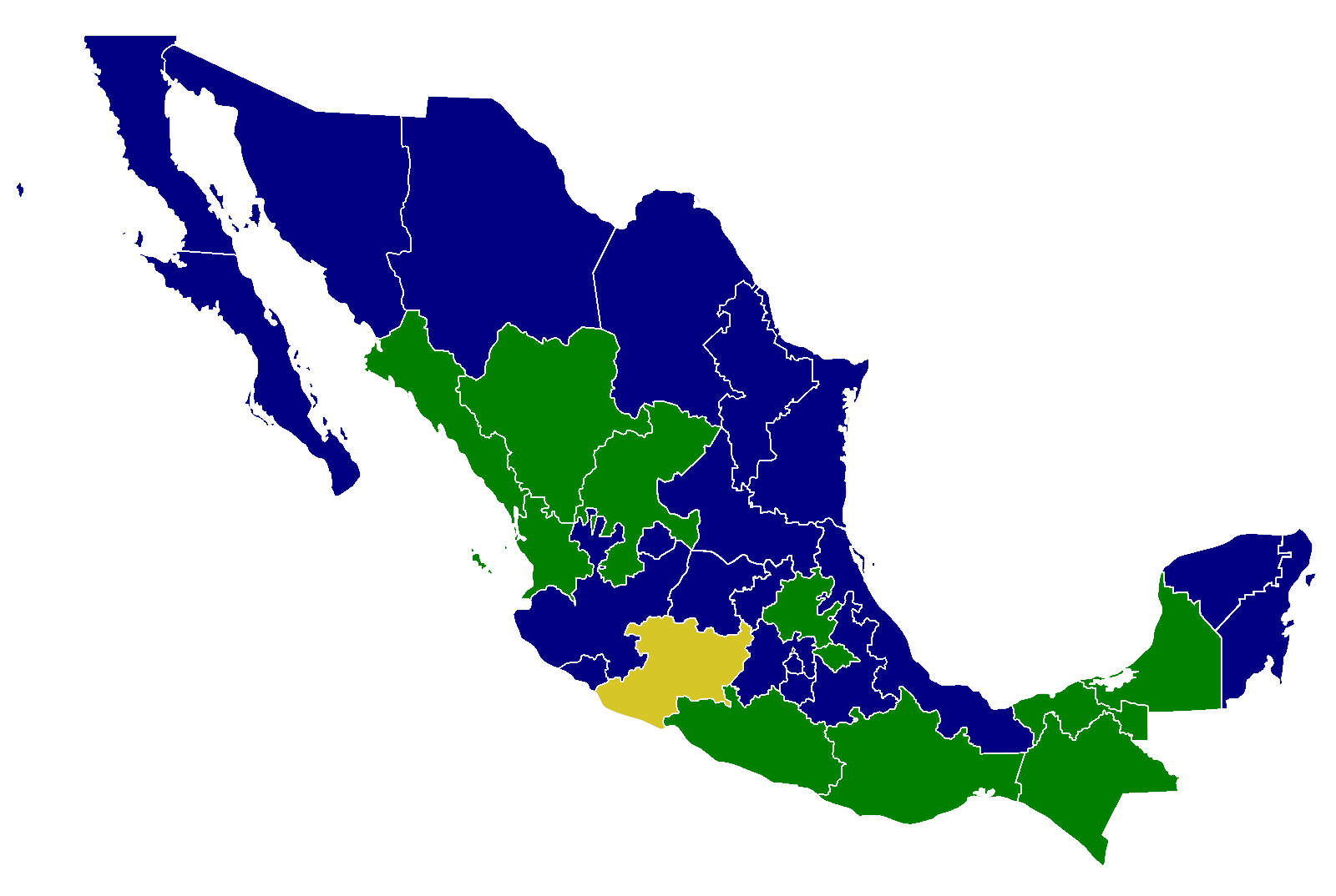 Basado en Plantilla de méxico, Resultados y Del PREP Y conteos distritales